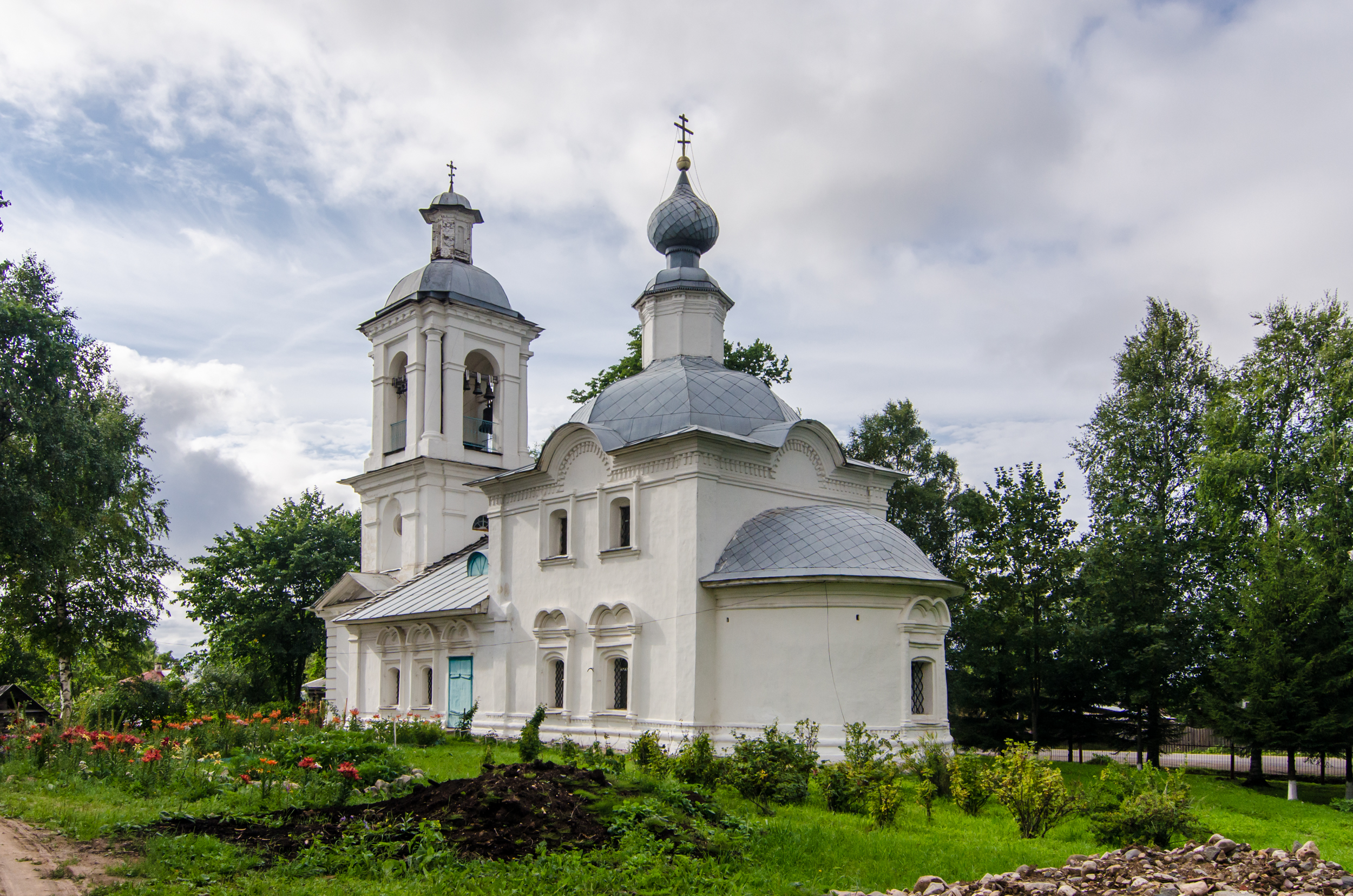 Церковь Богоявления с интерьером: улица Карла Маркса, 45, Белозерск, Белозерский район, Вологодская область